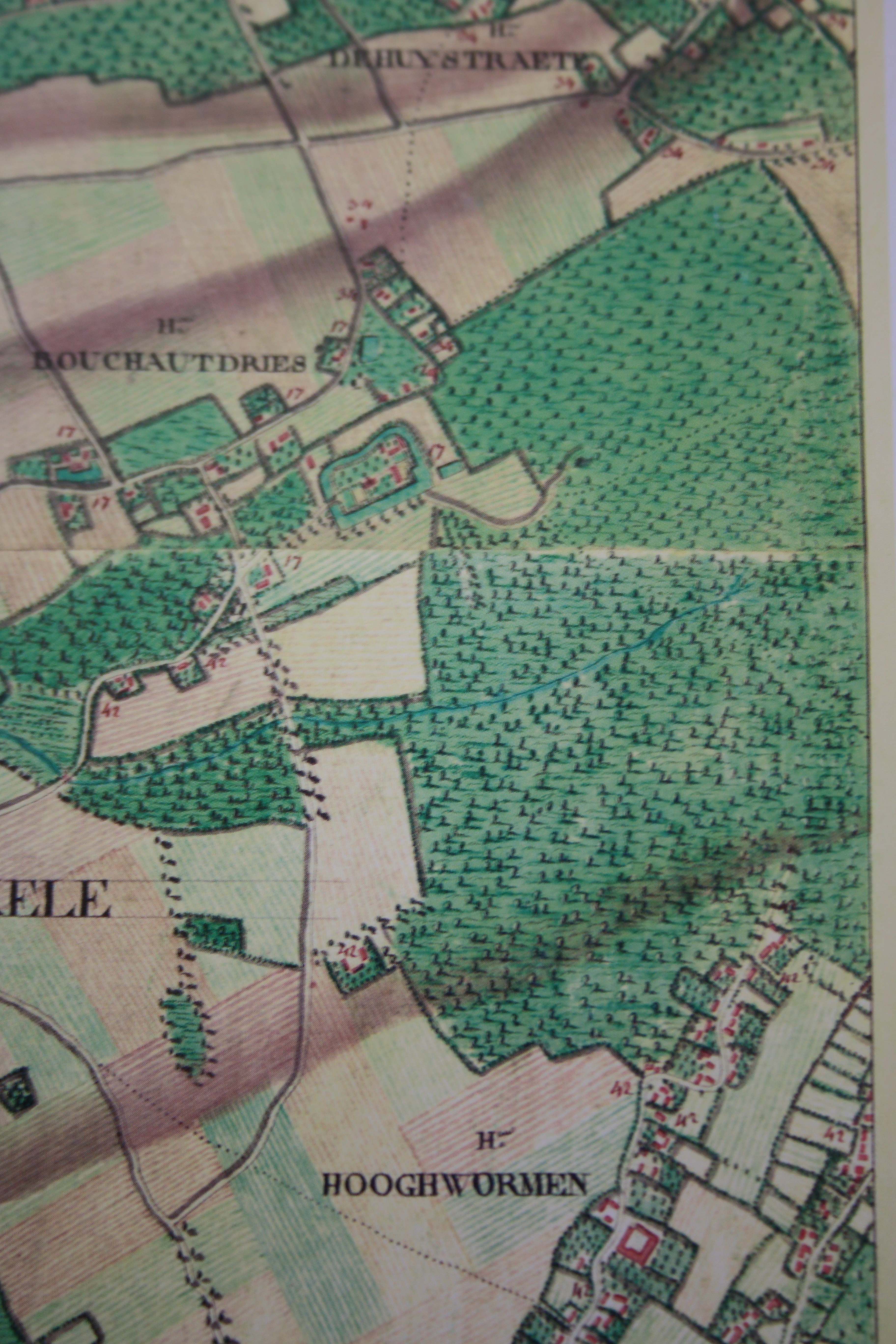 Munkbos Ferraris